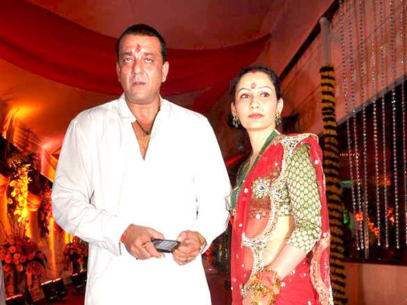 Sanjay Dutt and Manyata Dutt at Sanjay Dutt's Mata Ki Chowki